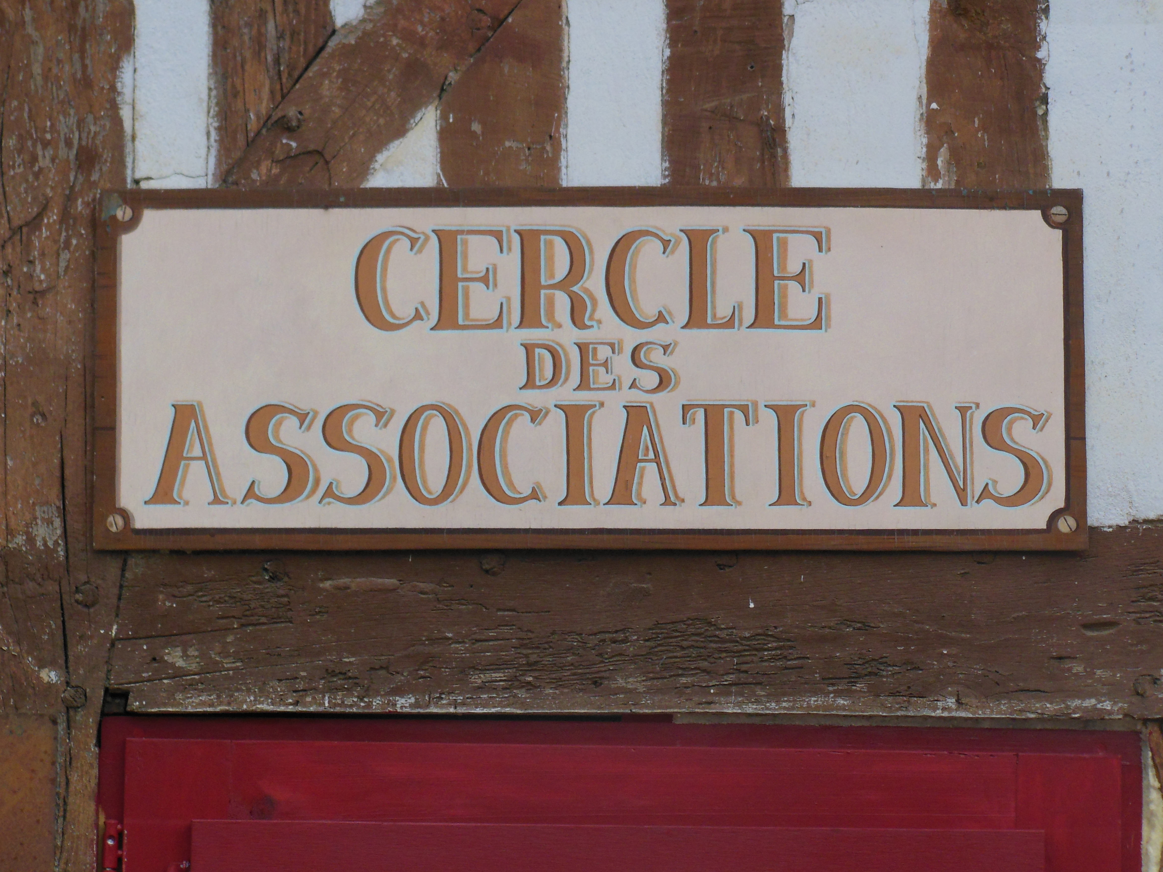 Cercle des associations de Garein (Landes, France)